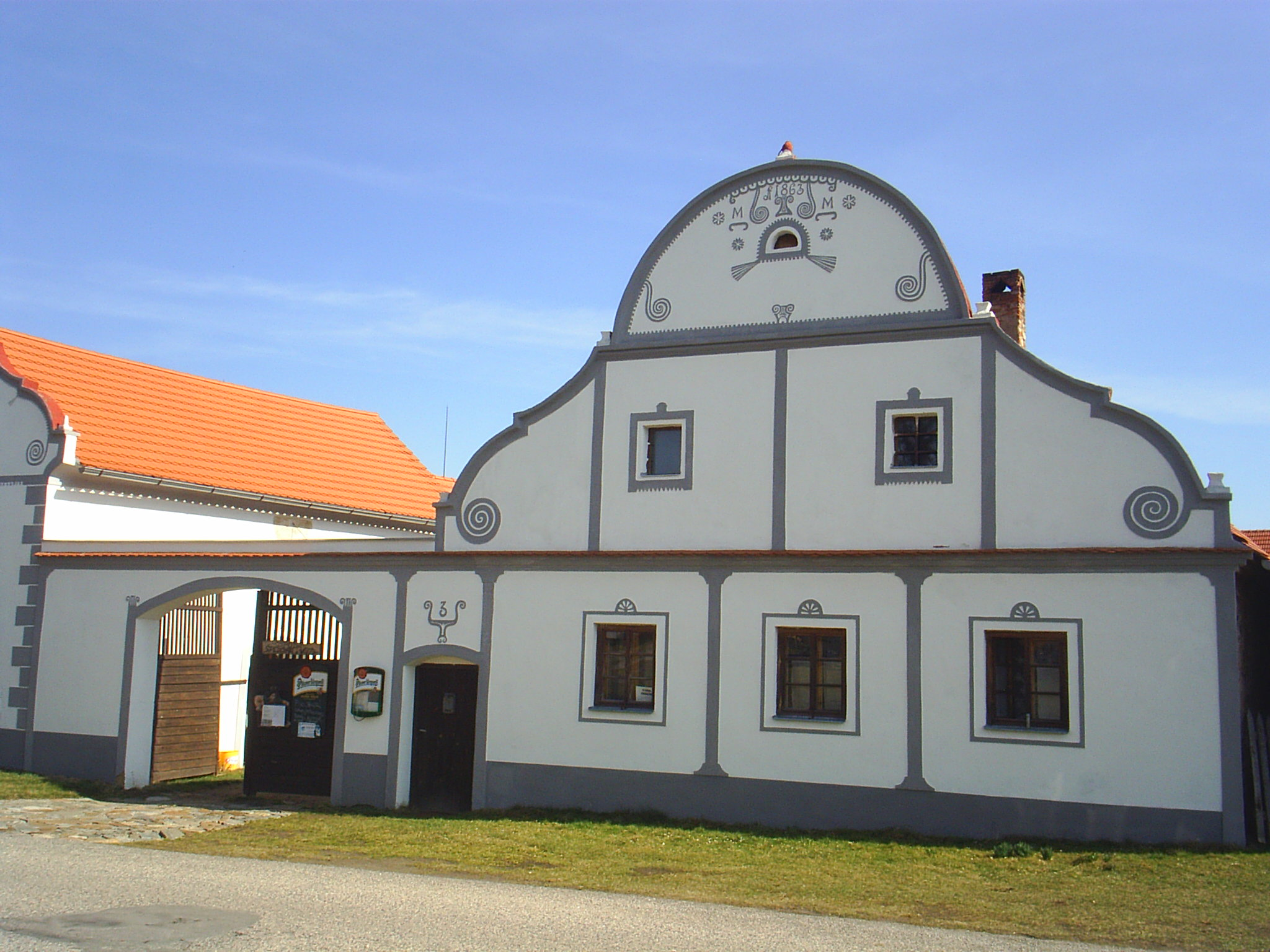 Holašovice-chráněná památka UNESCOEsperanto: Holašovice-protektata memorindaĵo de UNESCO